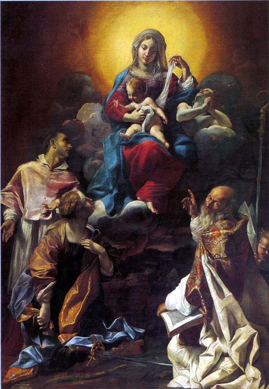 Vergine col Bambino in gloria tra i Santi Agostino, Borromeo e Caterina d'Alessandria